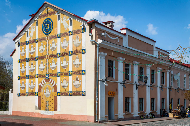 Гродна. Савецкая, 6